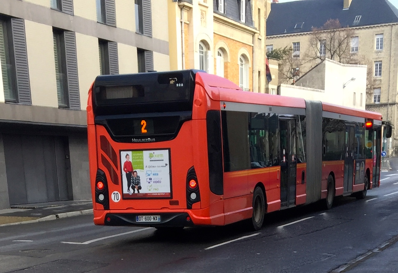 Bus numéro 908